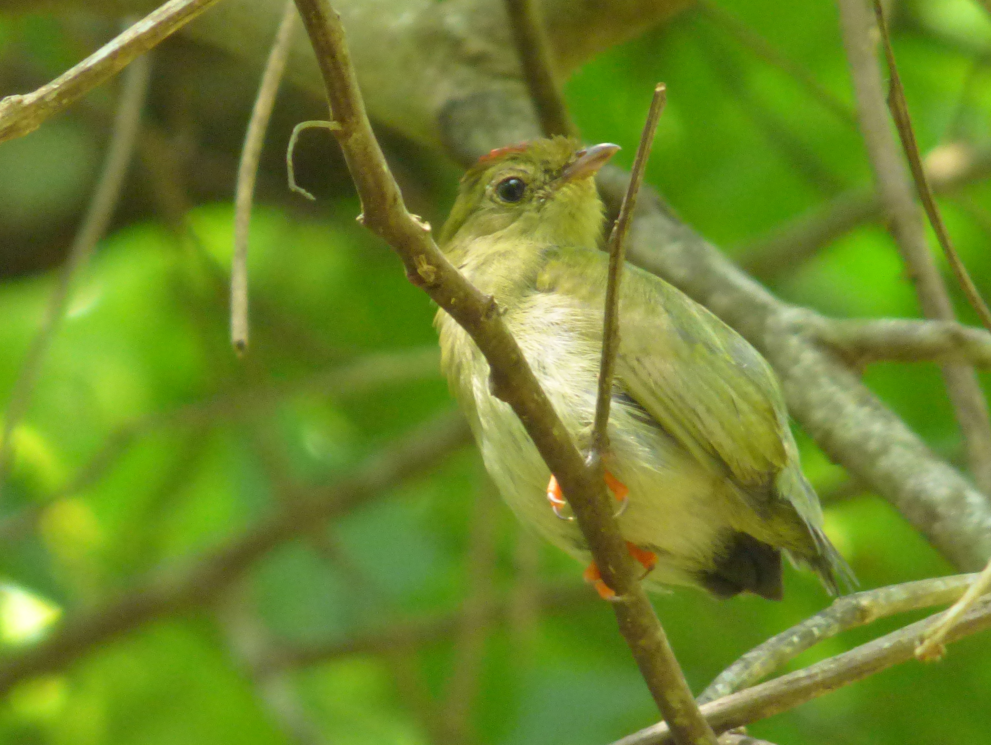 Chiroxiphia lanceolata (Saltarín coludo)